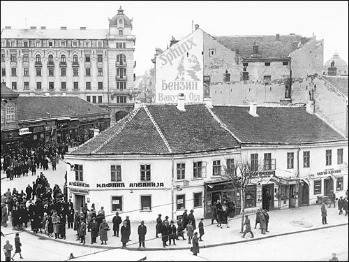 Kafane u Beogradu, početkom 20 veka- Kafana "Albanija"